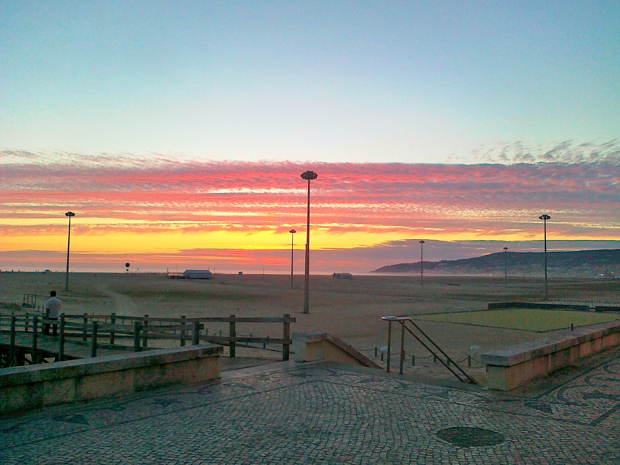 Playa del Reloj al atardecer